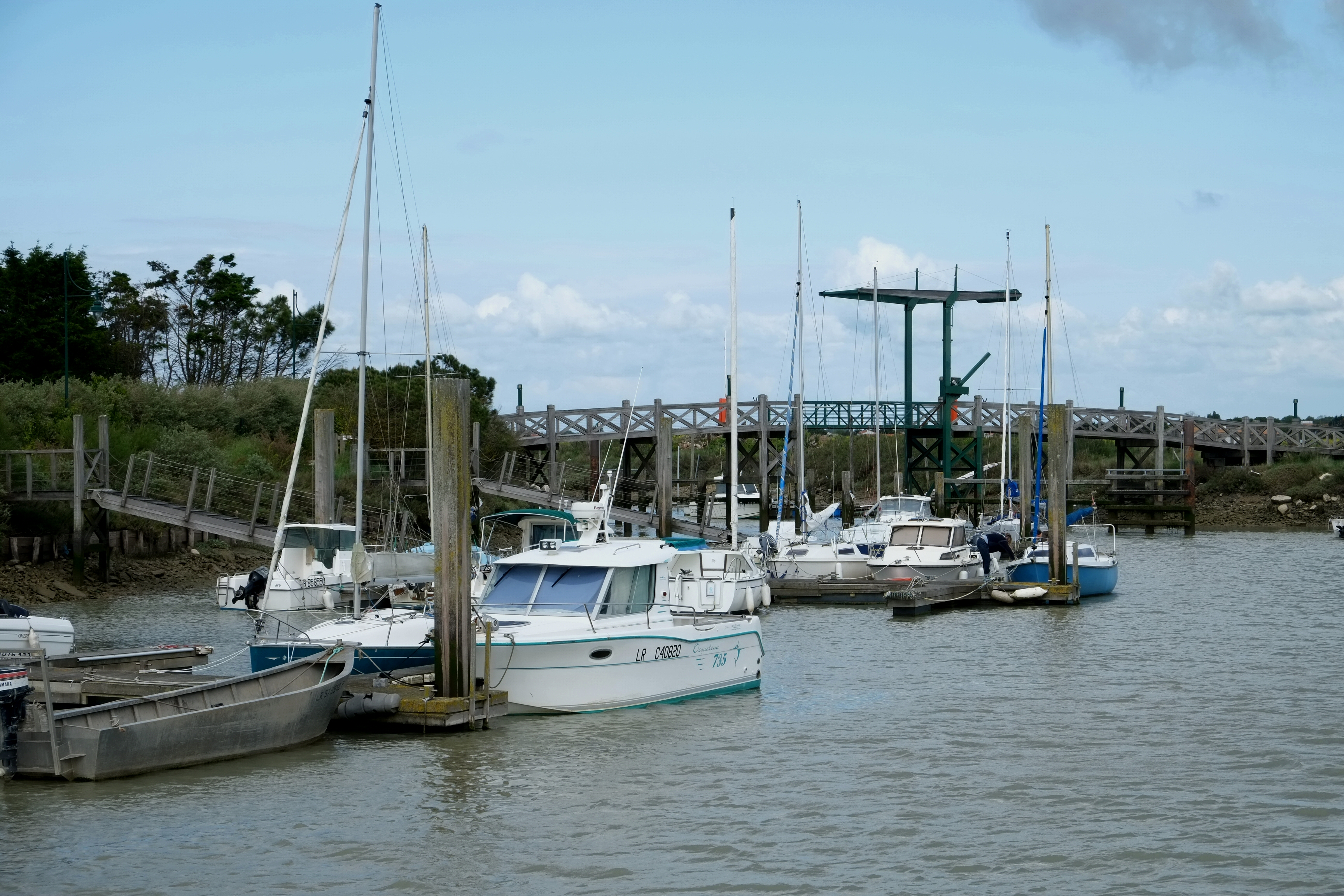 Le port du Plomb L'Houmeau Charente-Maritime France